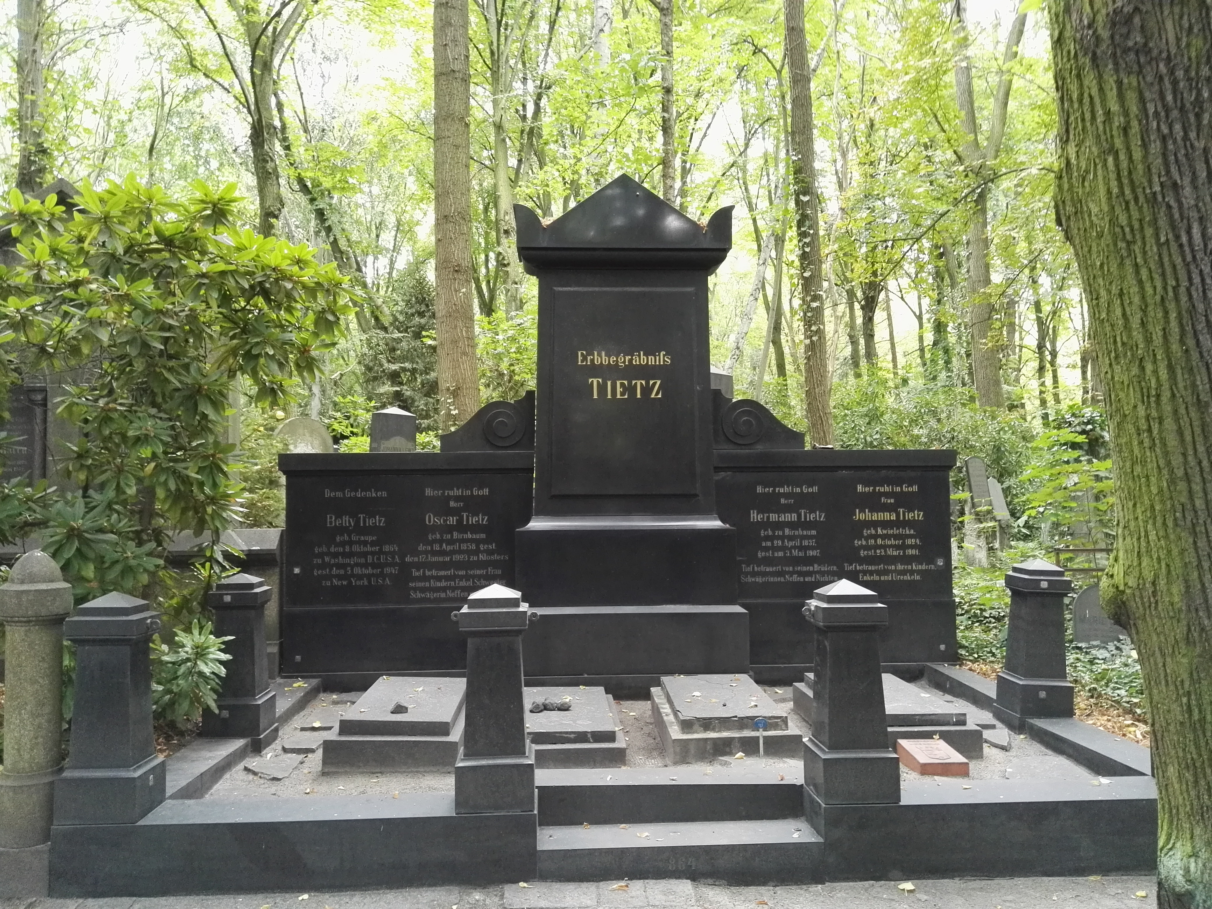 Grab von Oscar Tietz auf dem denkmalgeschützten Jüdischen Friedhof Berlin-Weißensee